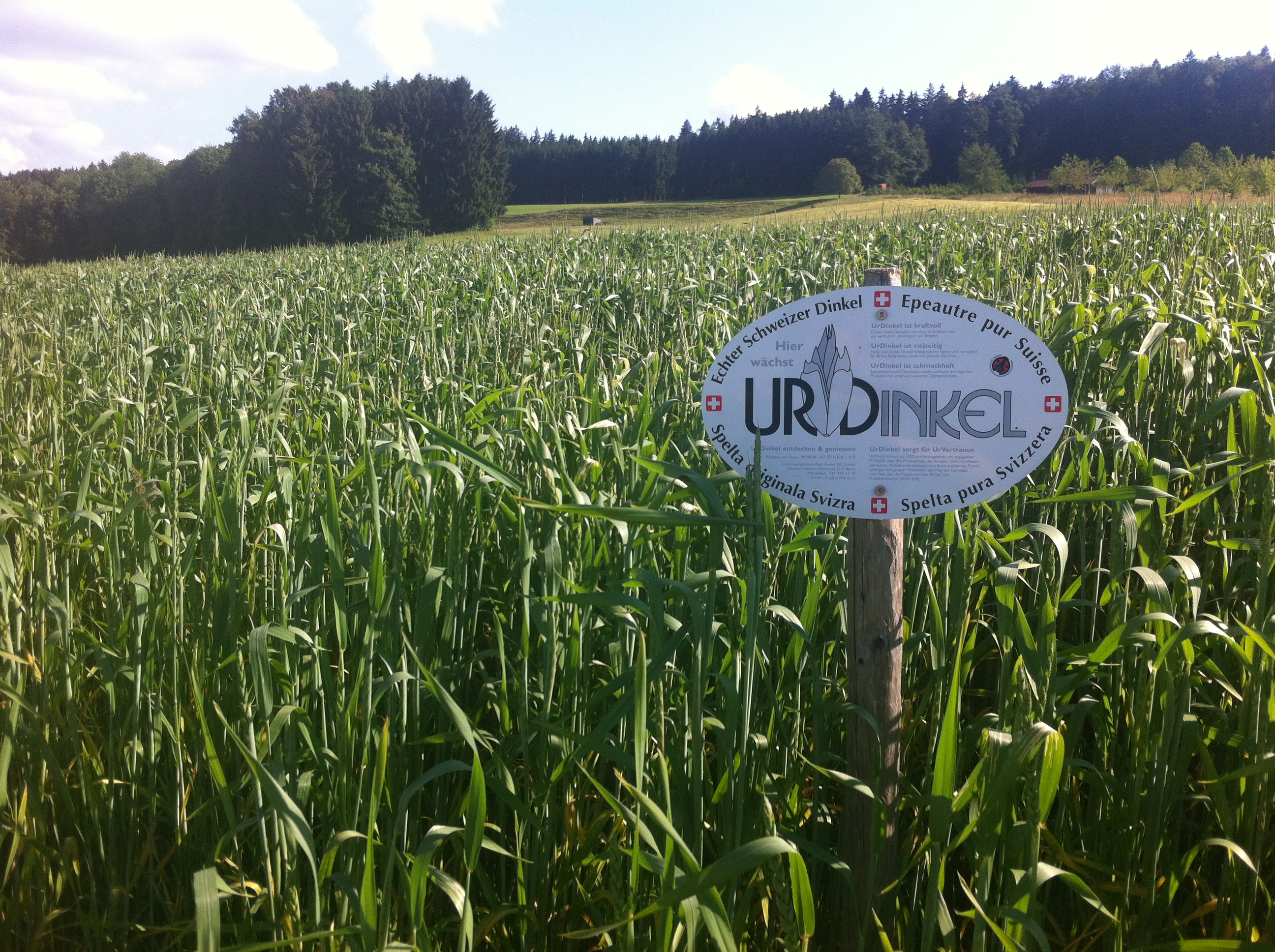 Urdinkelfeld in der Nähe von Buttwil (Kanton Aargau, Schweiz).